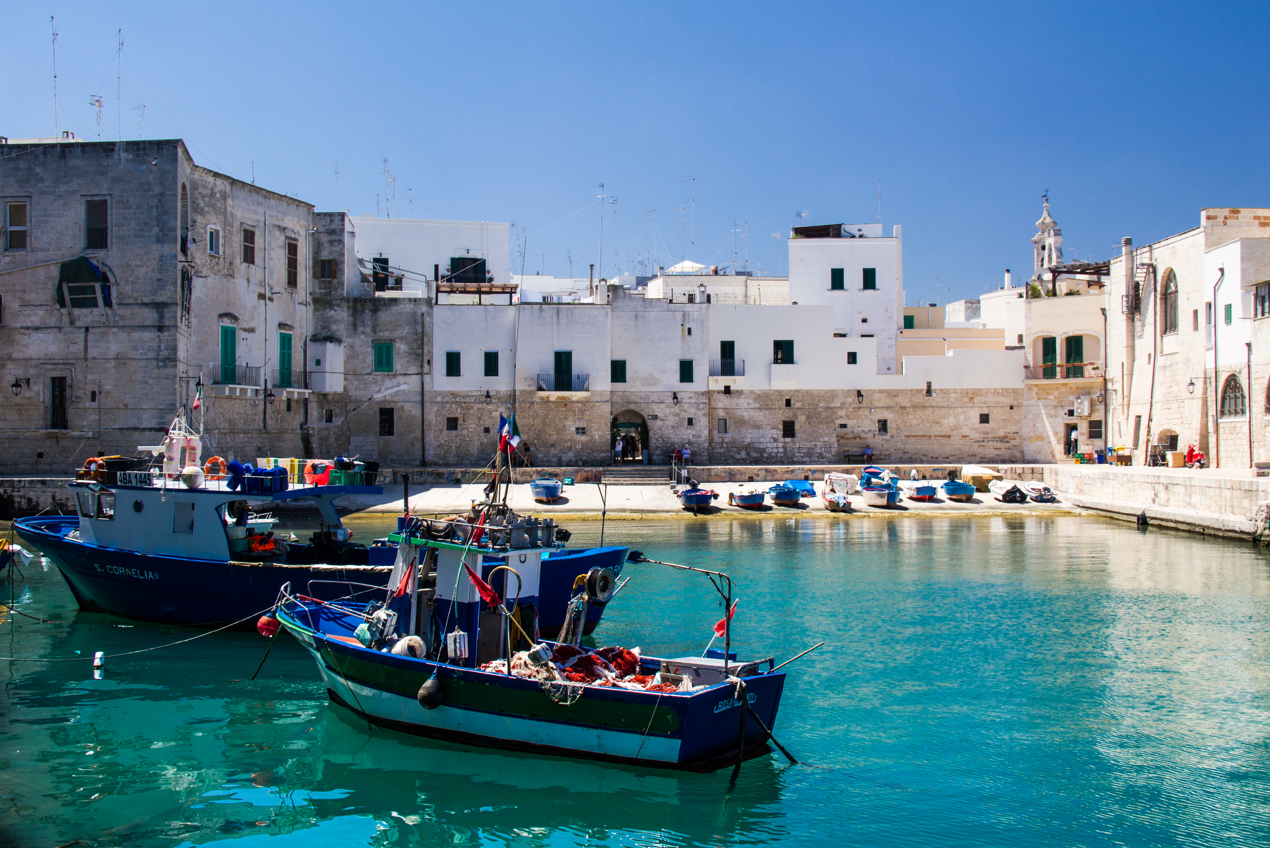 Il porto antico di Monopoli